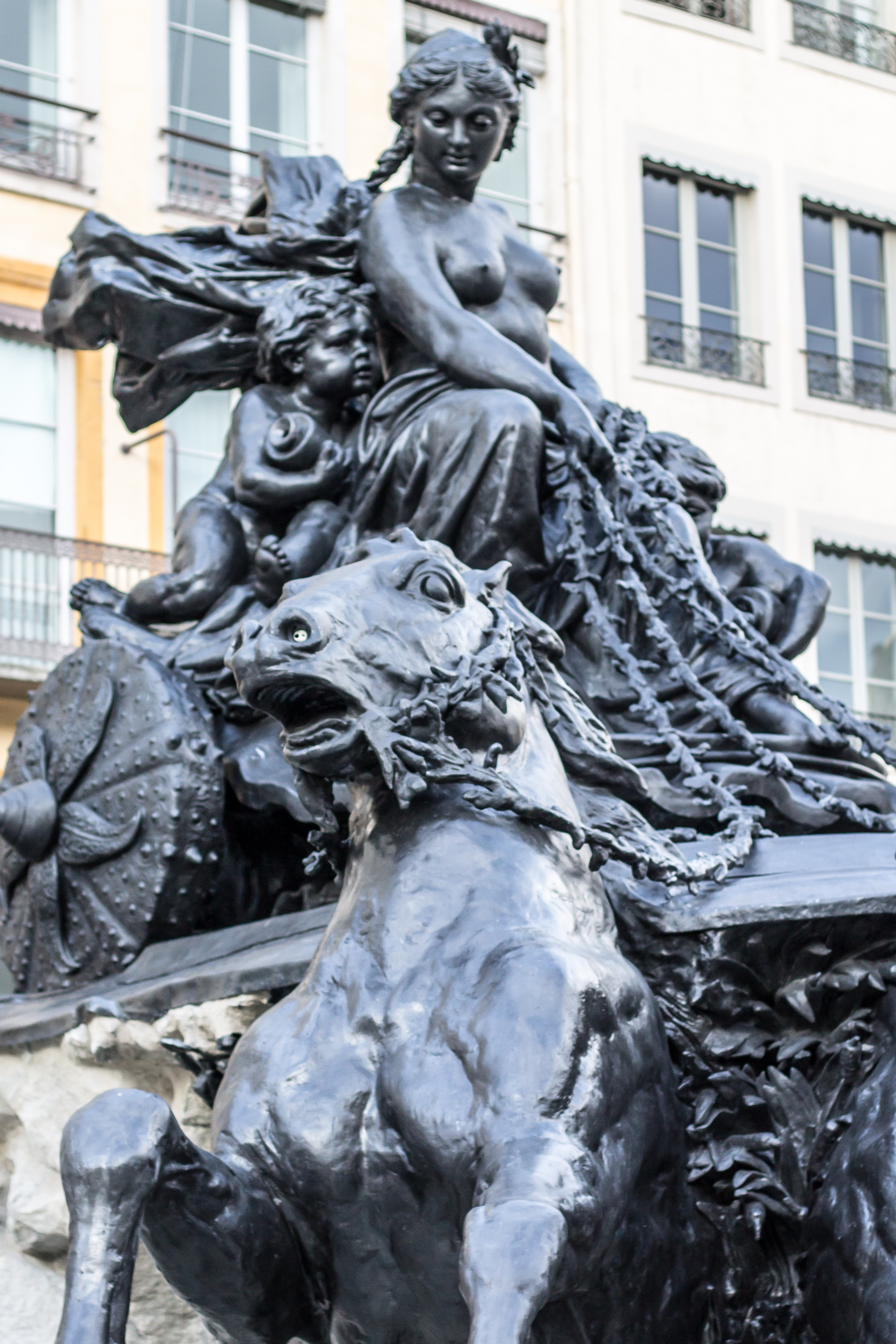 Détail de la fontaine Bartholdi après sa rénovation en 2017